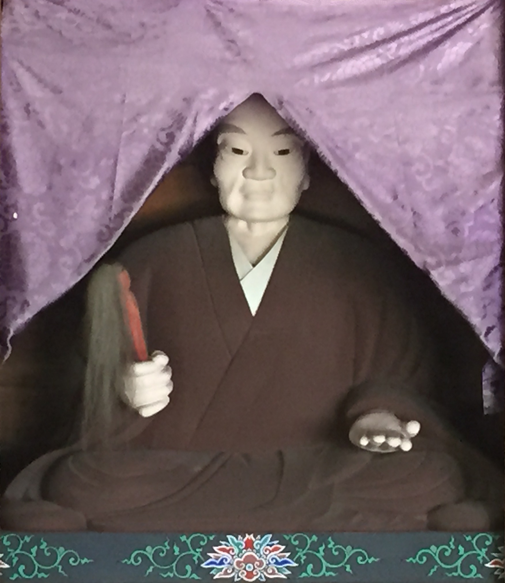 戸矢子有綱の木像。大悲山平等院大安寺（栃木県栃木市千塚町）所蔵。